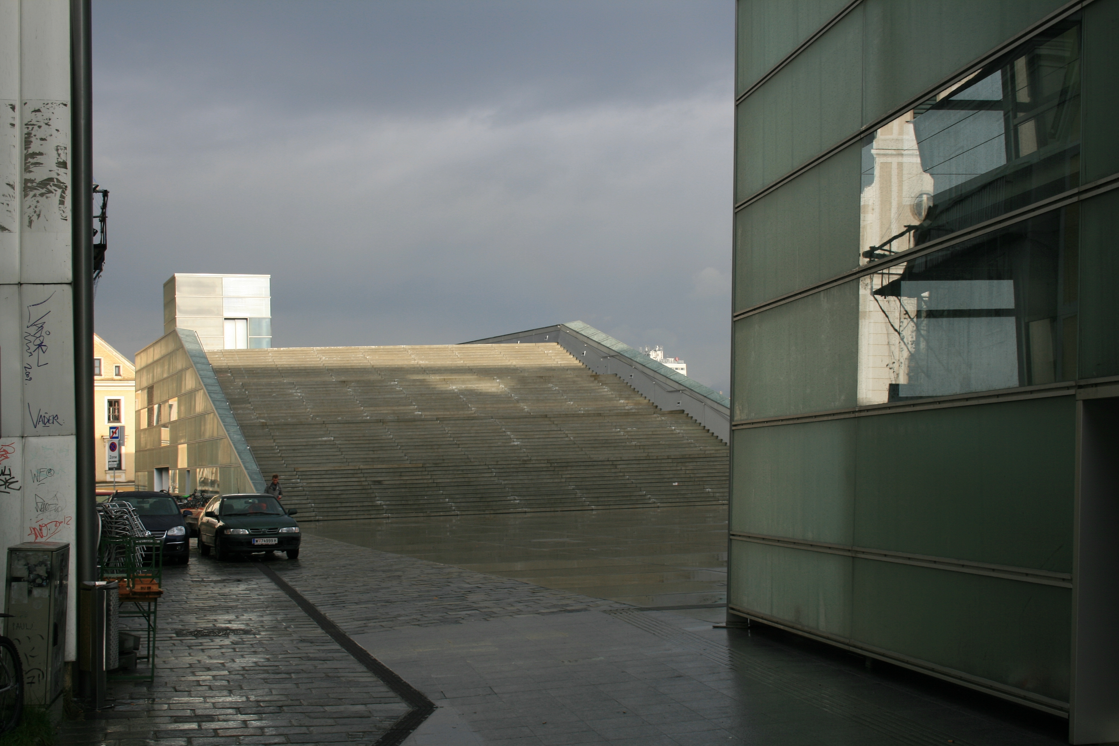 Vorplatz des Ars Electronica Centers mit Sitzstufen